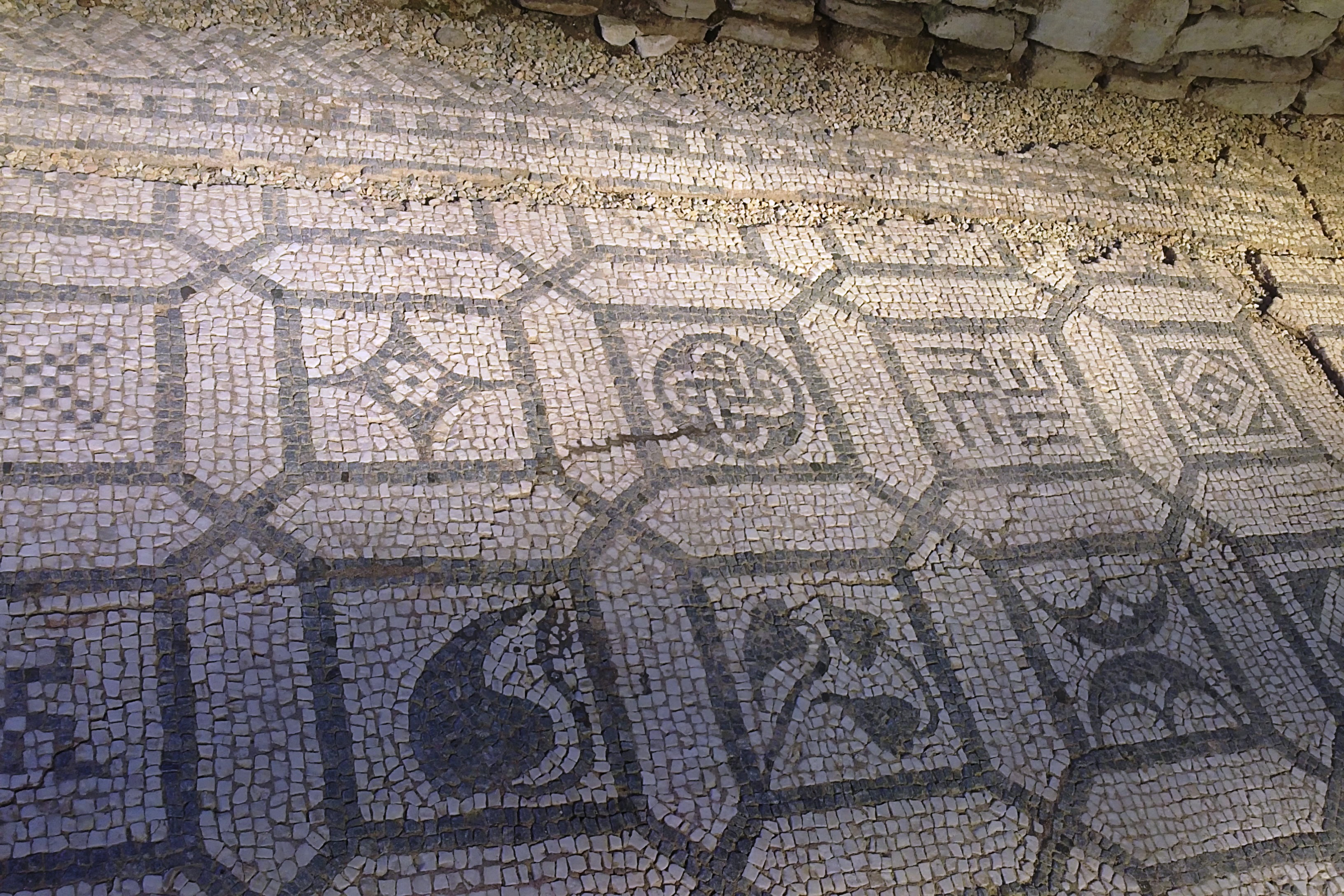 вила Армира